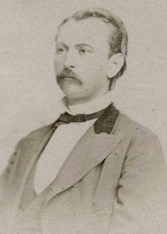 El arquitecto alemán Francisco Schmidt, que por orden del presidente ecuatoriano Gabriel García Moreno reformó varios edificios públicos de la ciudad de Quito. Su fama le permitió desrrollar uan próspera carrera en la capital ecuatoriana, en donde también levanto palacios y mansiones para la aristocracia local.